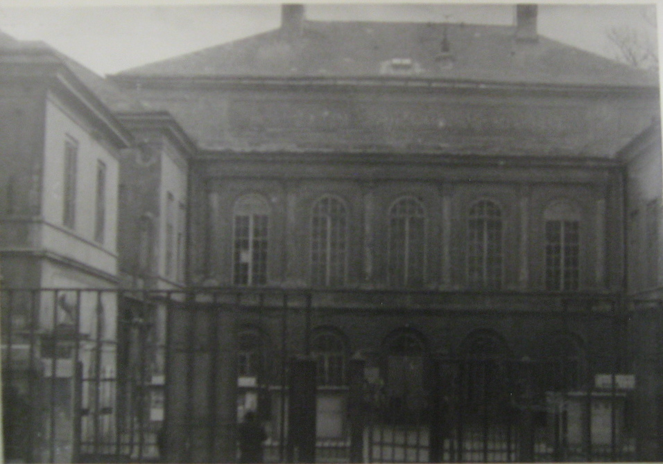 Czartoryski-Schlössel, Straßenfront. Inv. PK 612